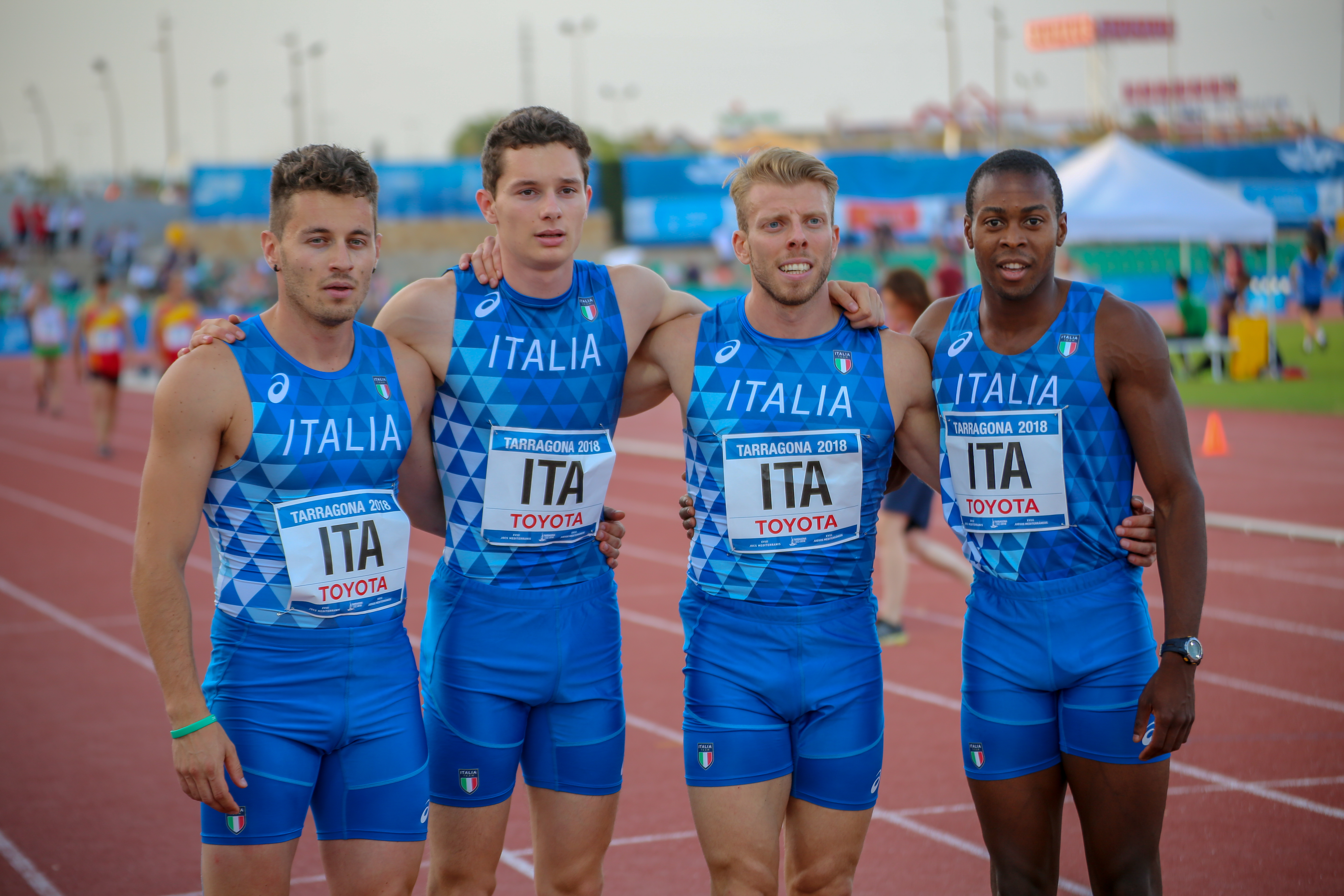 Italia en los relevos 4x100 en los Juegos del Mediterráneo 2018 (Federico Cattaneo, Filippo Tortu, Davide Manenti, Eseosa Desalu)